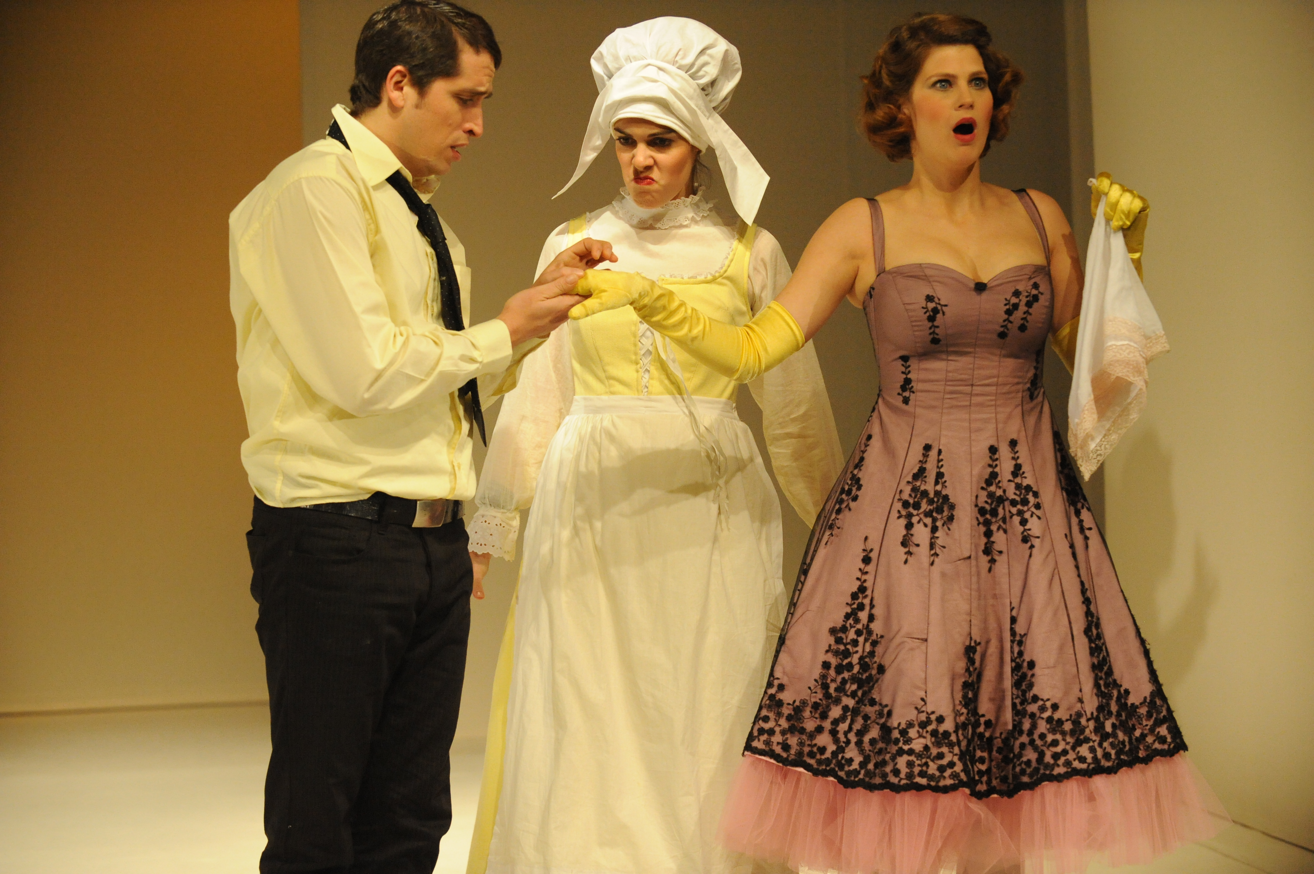 שמרית לוסטיג, נילי רוגל ויואב היימן ב"תעלולי סקפן", בבימויו של אודי בן-משה, תיאטרון החאן, 2010